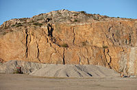 granitttt örnekkk